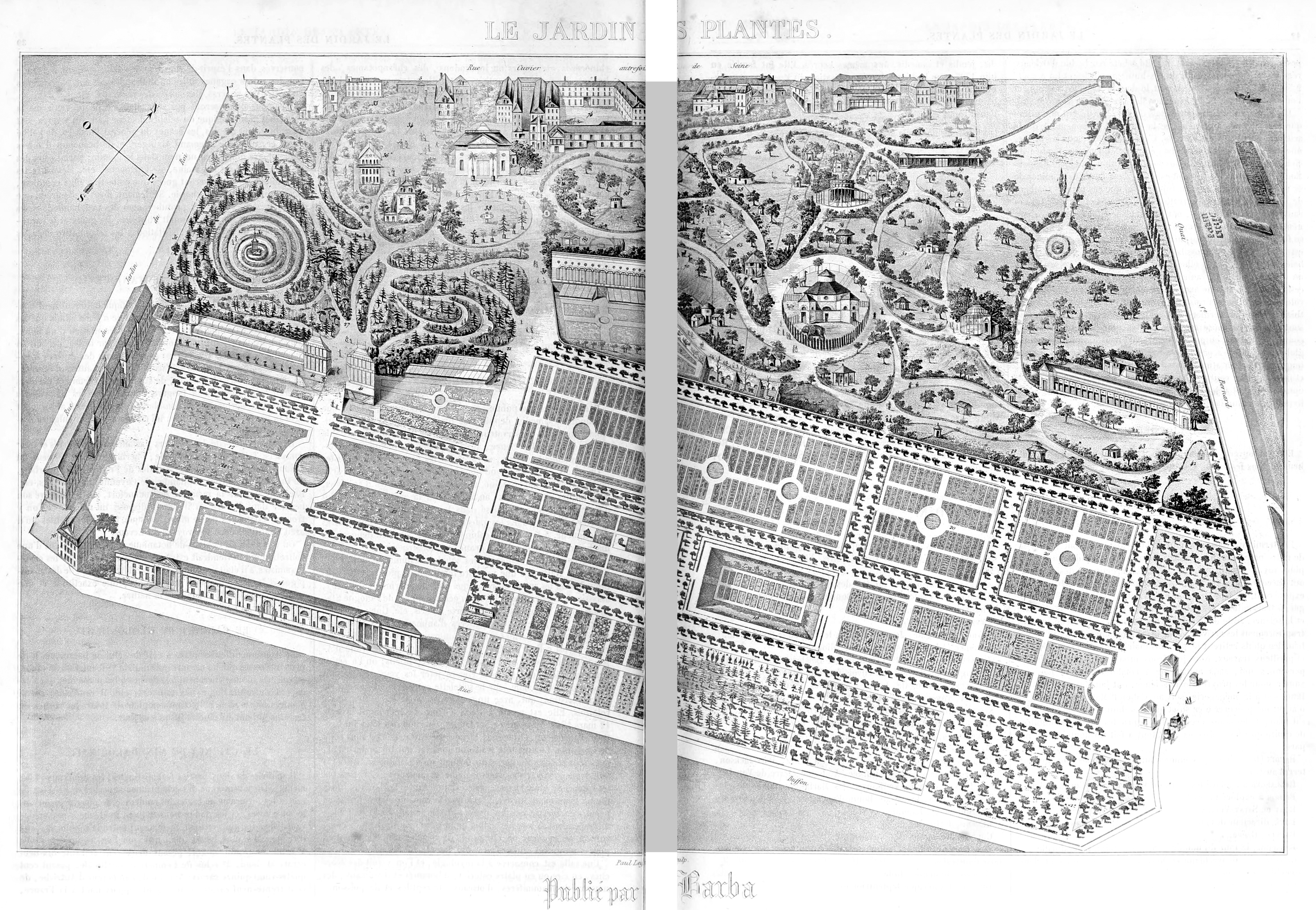 Jardin des plantes de Paris 1851